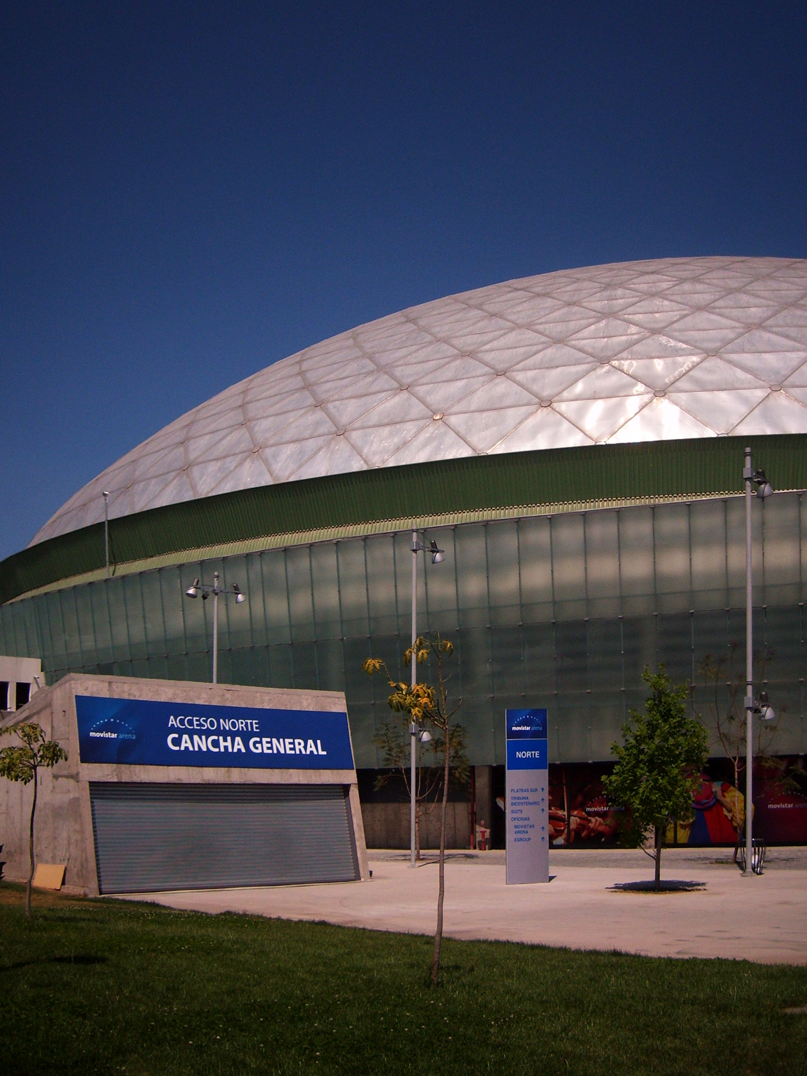 El acceso a la cancha general del Movistar Arena, ubicado en la elipse del Parque O'Higgins en Santiago de Chile.